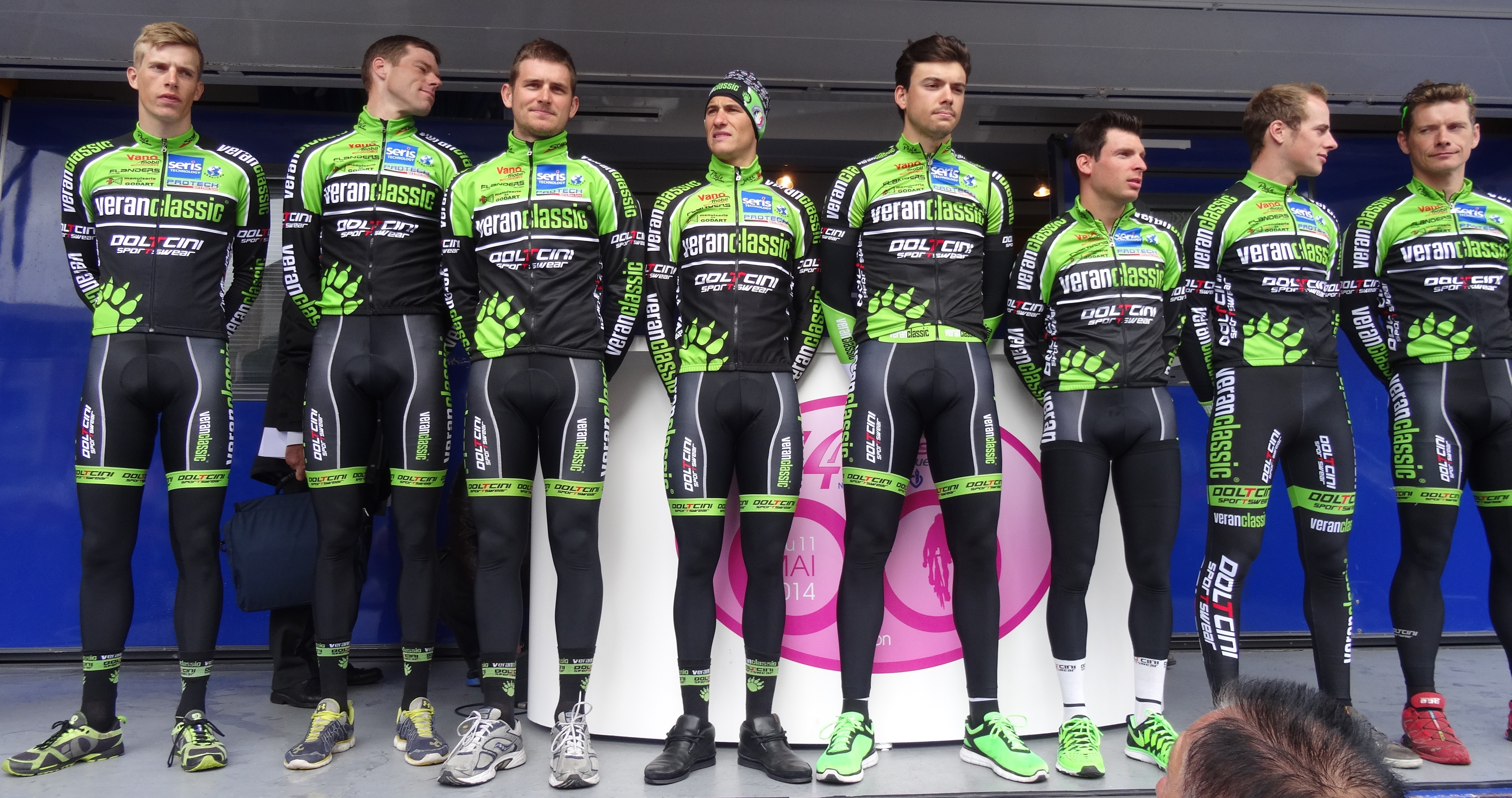 Reportage photographique réalisé le mercredi 7 mai 2014 au départ de la première étape de l'édition 2014 des Quatre jours de Dunkerque à Dunkerque, Nord, Nord-Pas-de-Calais, France. Depicted people: Rick Ottema, Wouter Mol, Cameron Karwowski, Joeri Stallaert, Giorgio Brambilla, Sascha Weber, Tom Goovaerts and Gorik Gardeyn Depicted team: Veranclassic-Doltcini